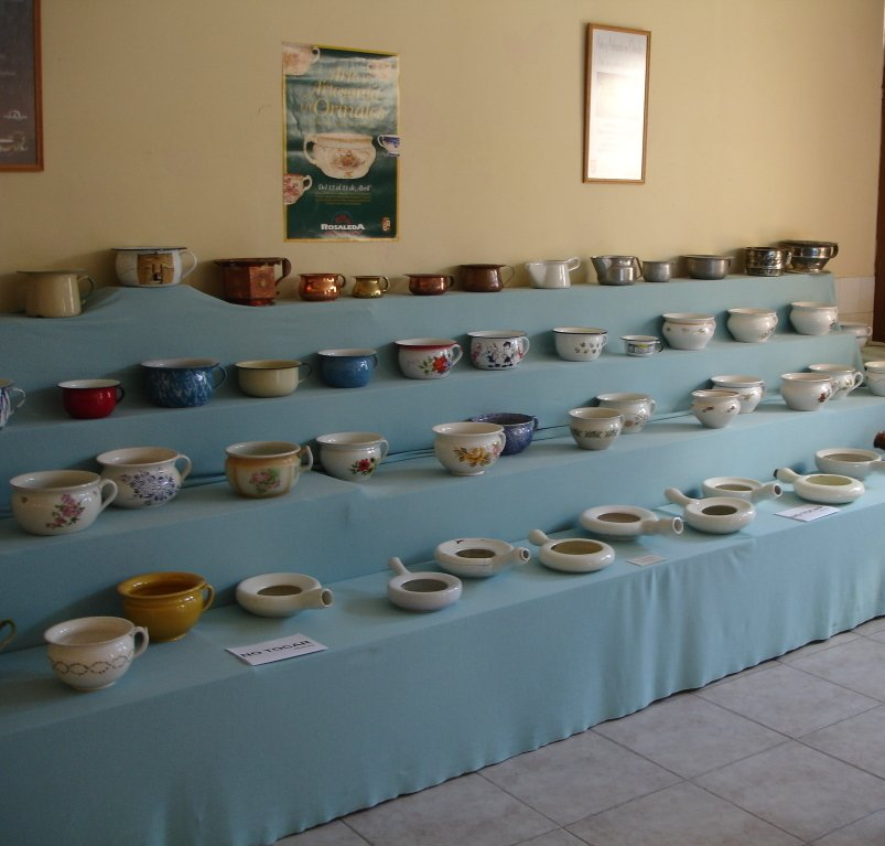 Exposición itinerante de orinales en Ciudad Rodrigo (Salamanca, Castilla y León, España).